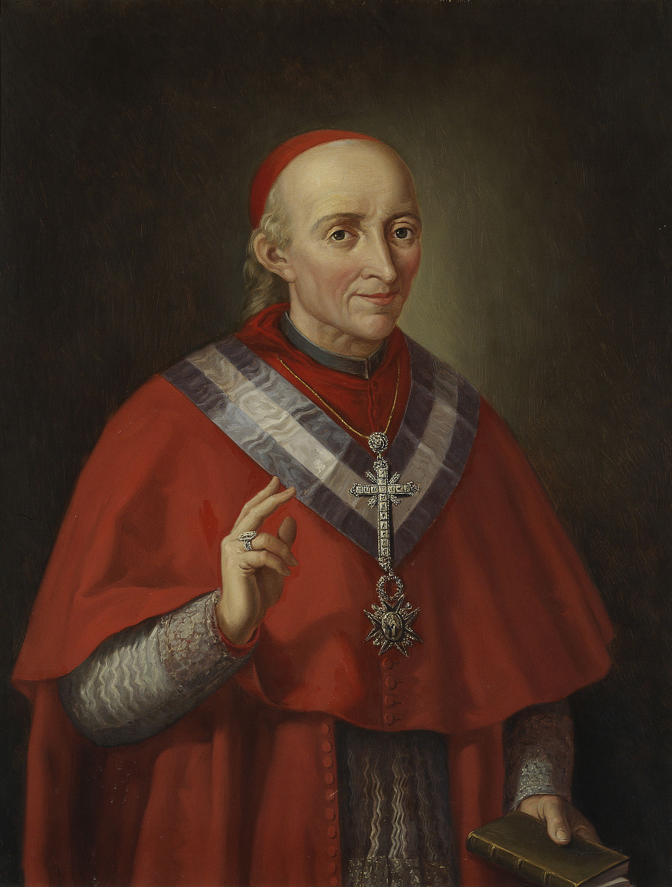 Retrato del eclesiástico español Francisco Antonio de Lorenzana (1722-1804), que llegó a ser cardenal de la Iglesia Católica, obispo de Plasencia, Inquisidor General de España y arzobispo de México y de Toledo. Esta obra es una copia del retrato del arzobispo conservado en la biblioteca de la catedral de Toledo, y el retratado luce sobre su muceta roja la banda y la gran cruz de la Orden de Carlos III.